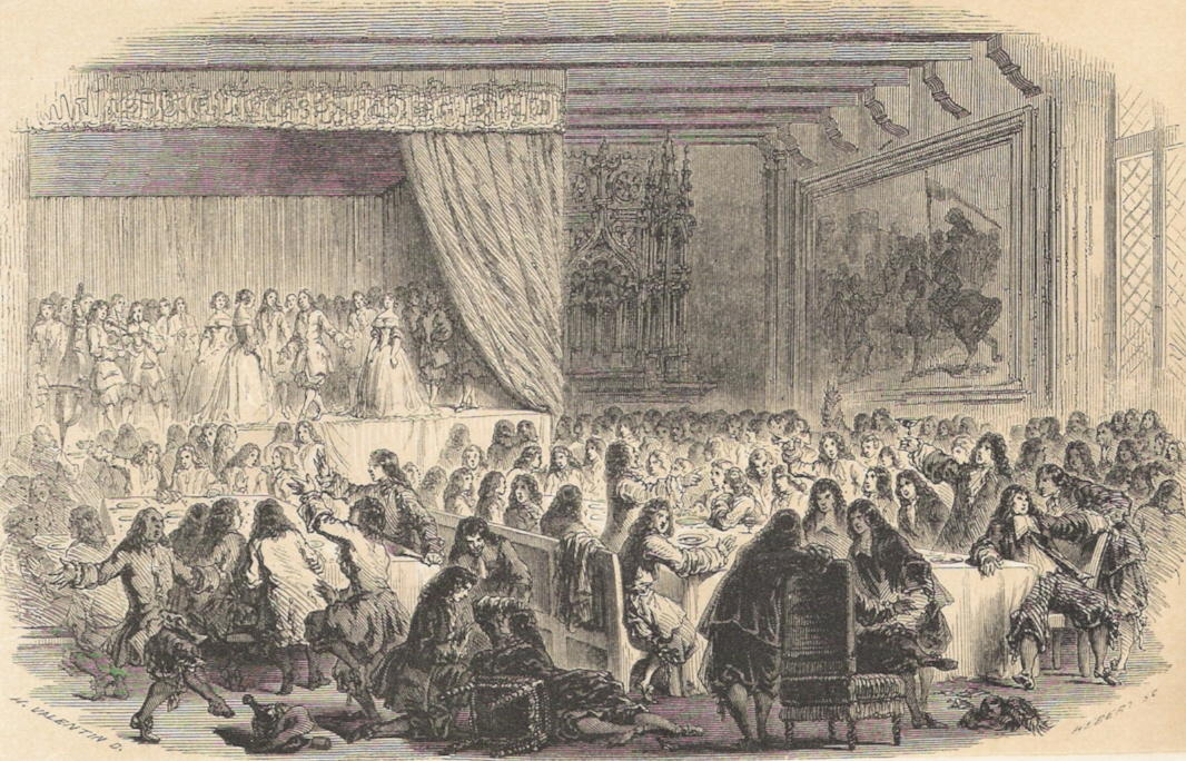 Banquet de la confrérie de saint Job, Bruxelles 1690. Gravure du XIX siècle. Collection privée.